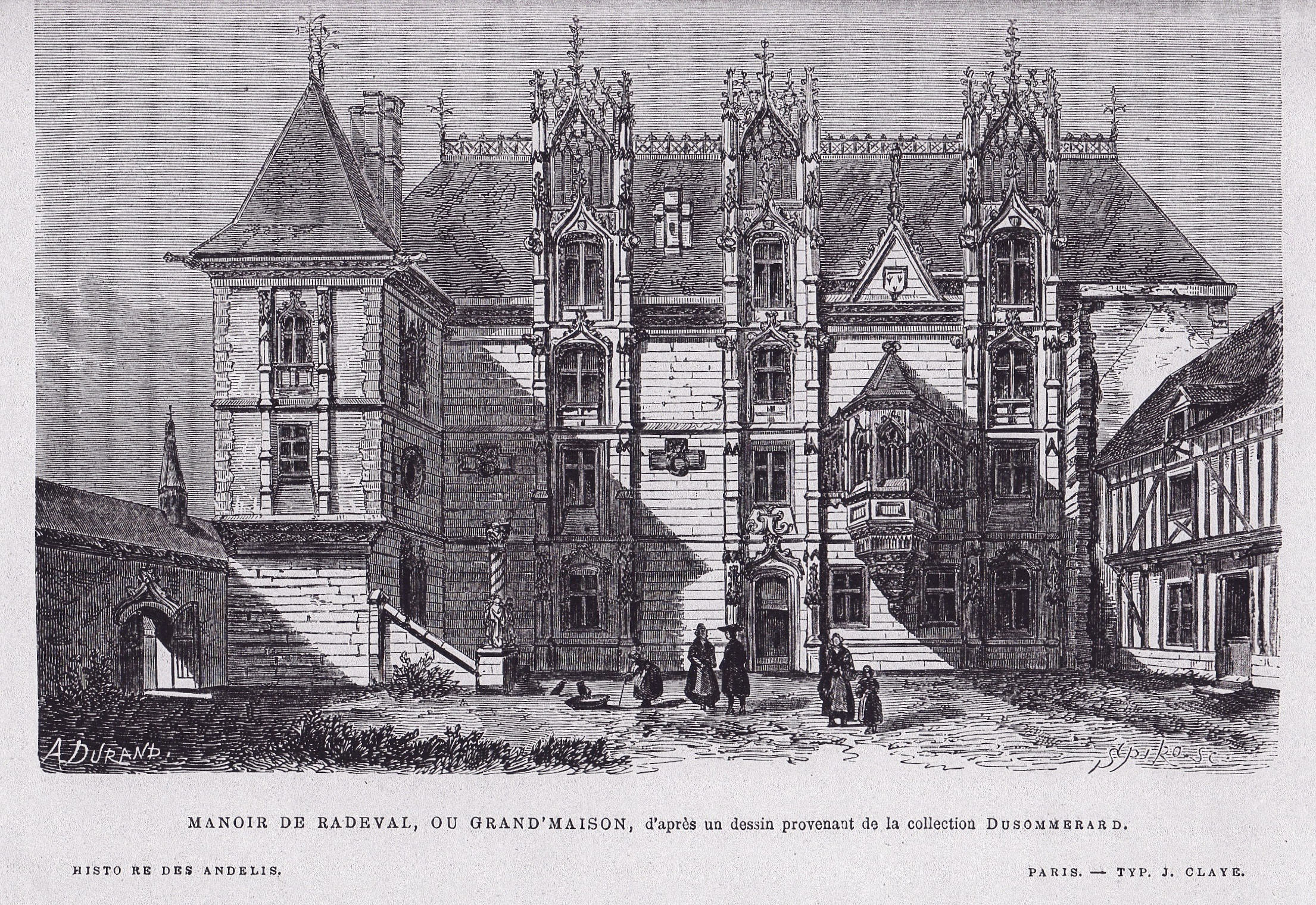 Manoir de Radeval, ou Grand-Maison, aux Andelys, rue de la Boullaye